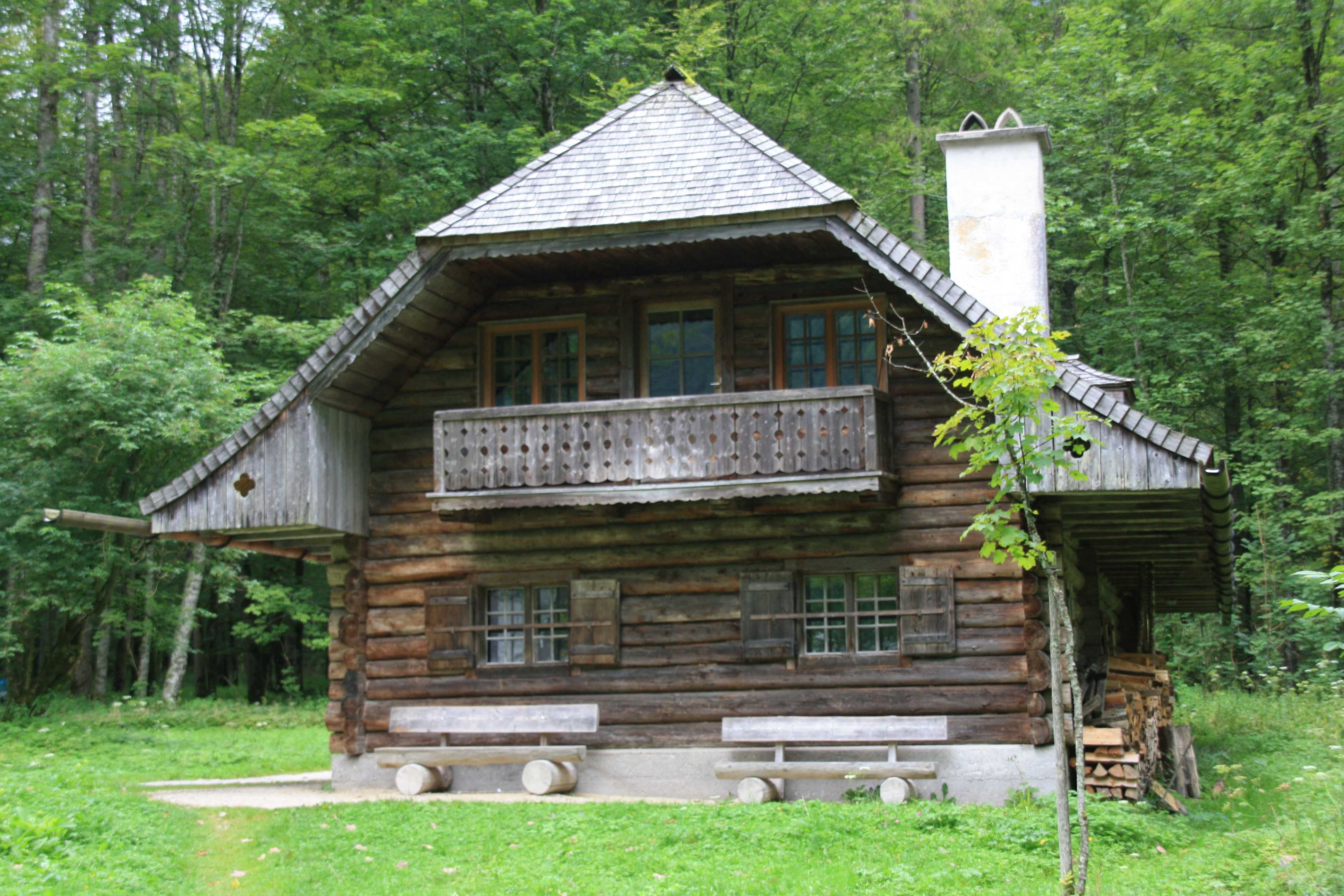 Die Nationalpark-Informationsstelle in St. Bartholomä am Königssee in Oberbayern